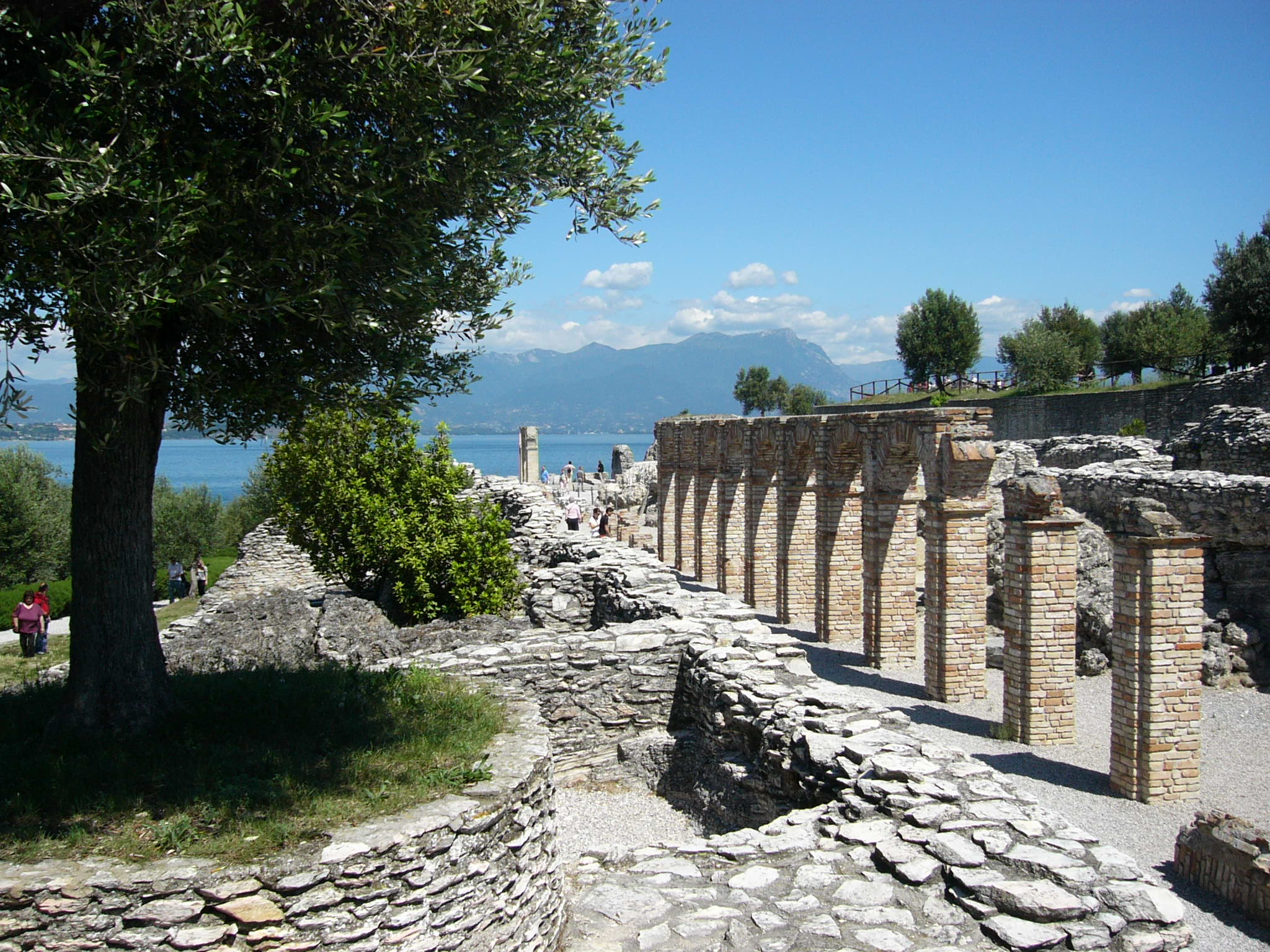 grotte di Catullo This is a photo of a monument which is part of cultural heritage of Italy.